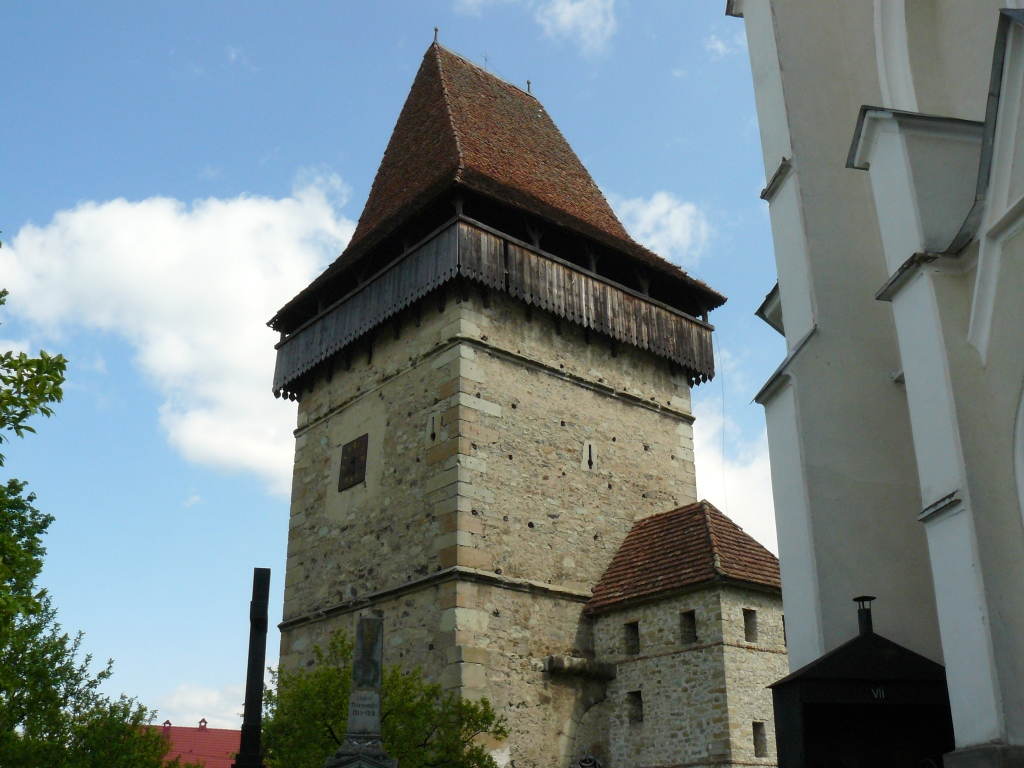 Turnul clopotniță, ("Turnul Slăninilor") 03